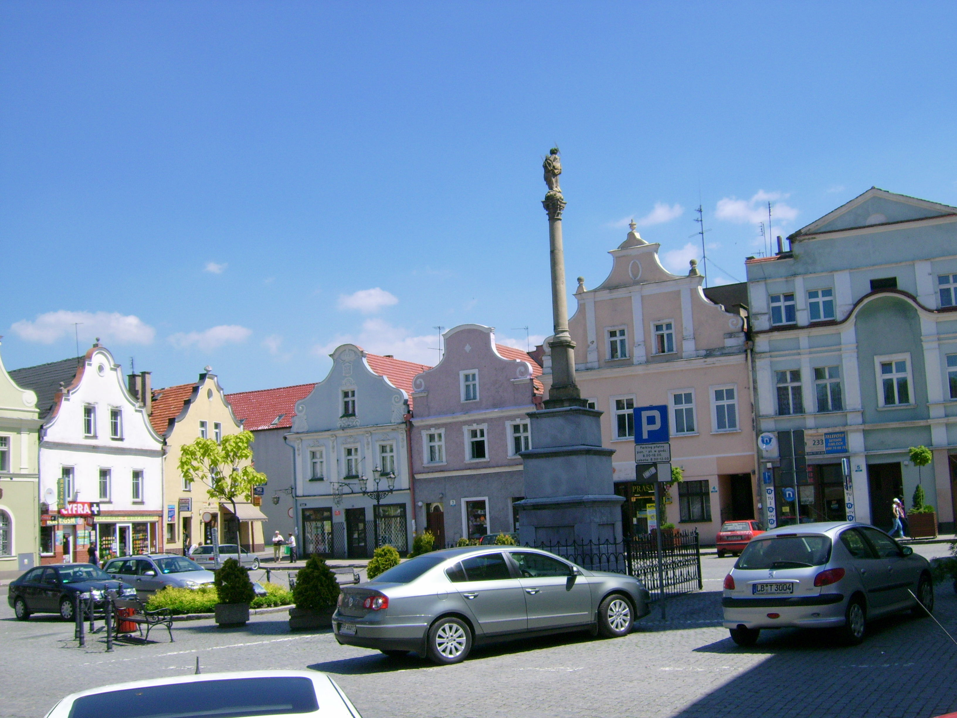 Kamieniczki w rynku.